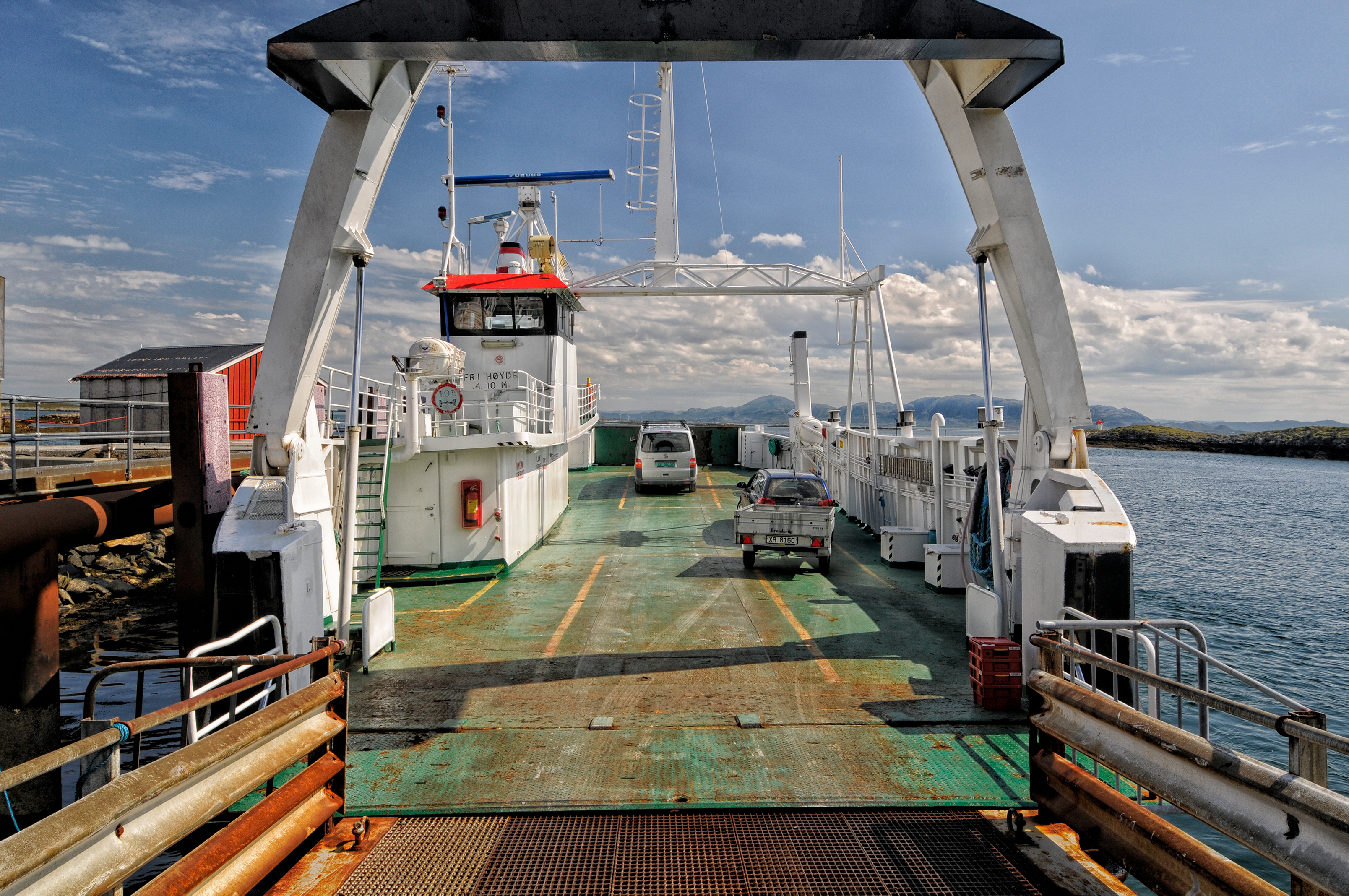 Stokksundferja i sambandet Dypfest-Tarva ved anløpet på Husøya